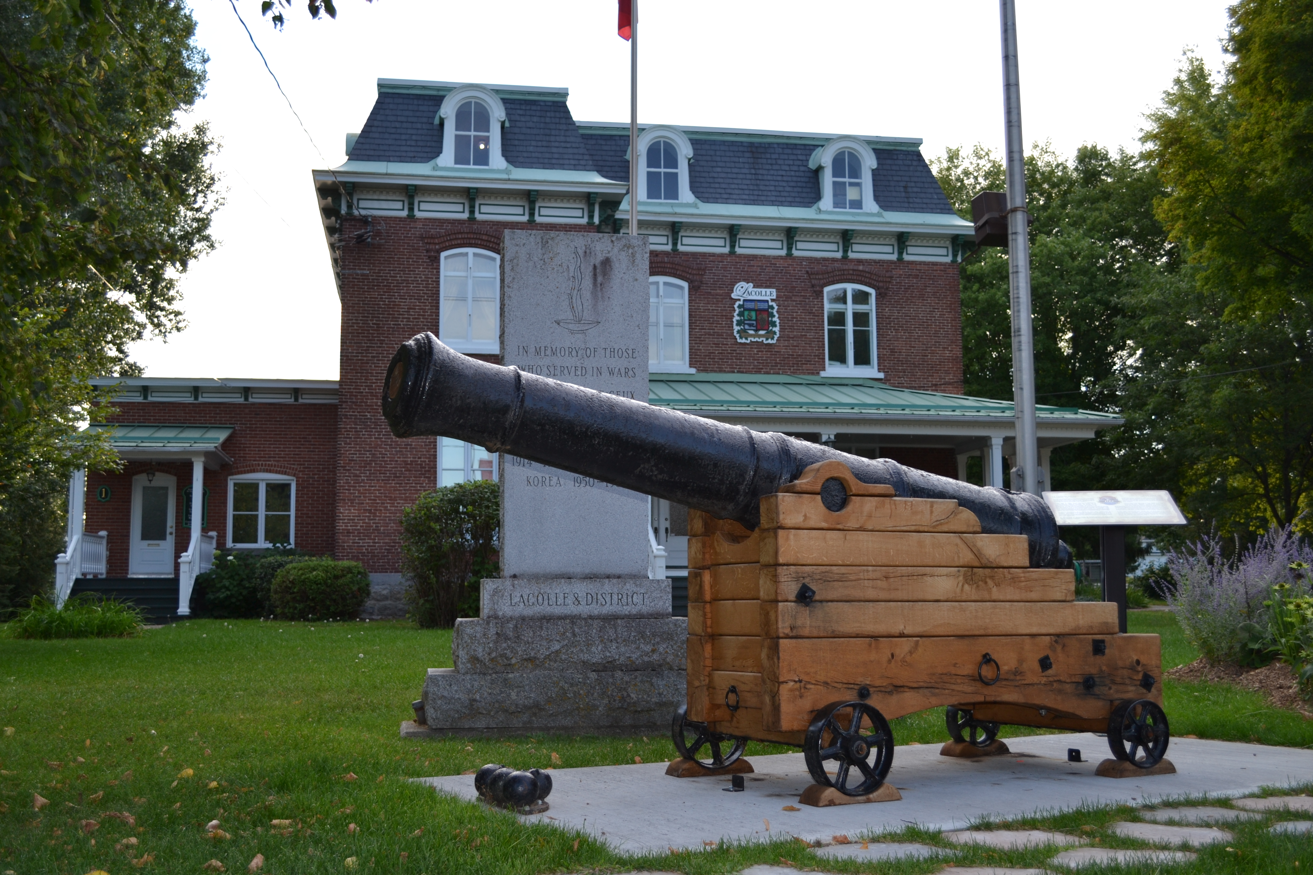 L'édifice du 1, rue de l'Église Sud, actuellement la mairie de Lacolle, est une résidence d'influence Second Empire construite à la fin du XIXe siècle.